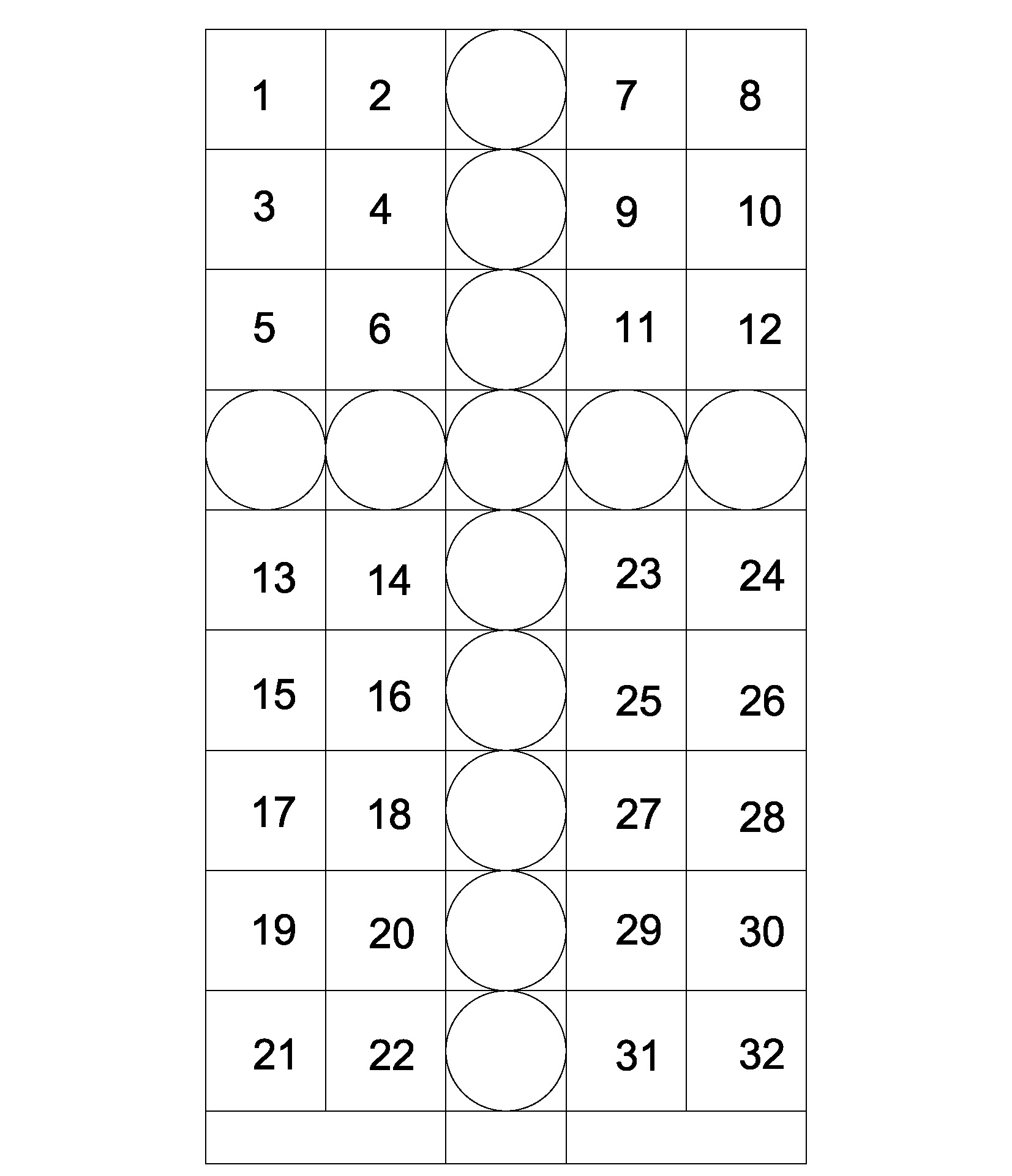 Araldica militare del portone Monumentale - Monumento ai caduti della prima guerra mondilale di Vito Pardo a Montecarotto.